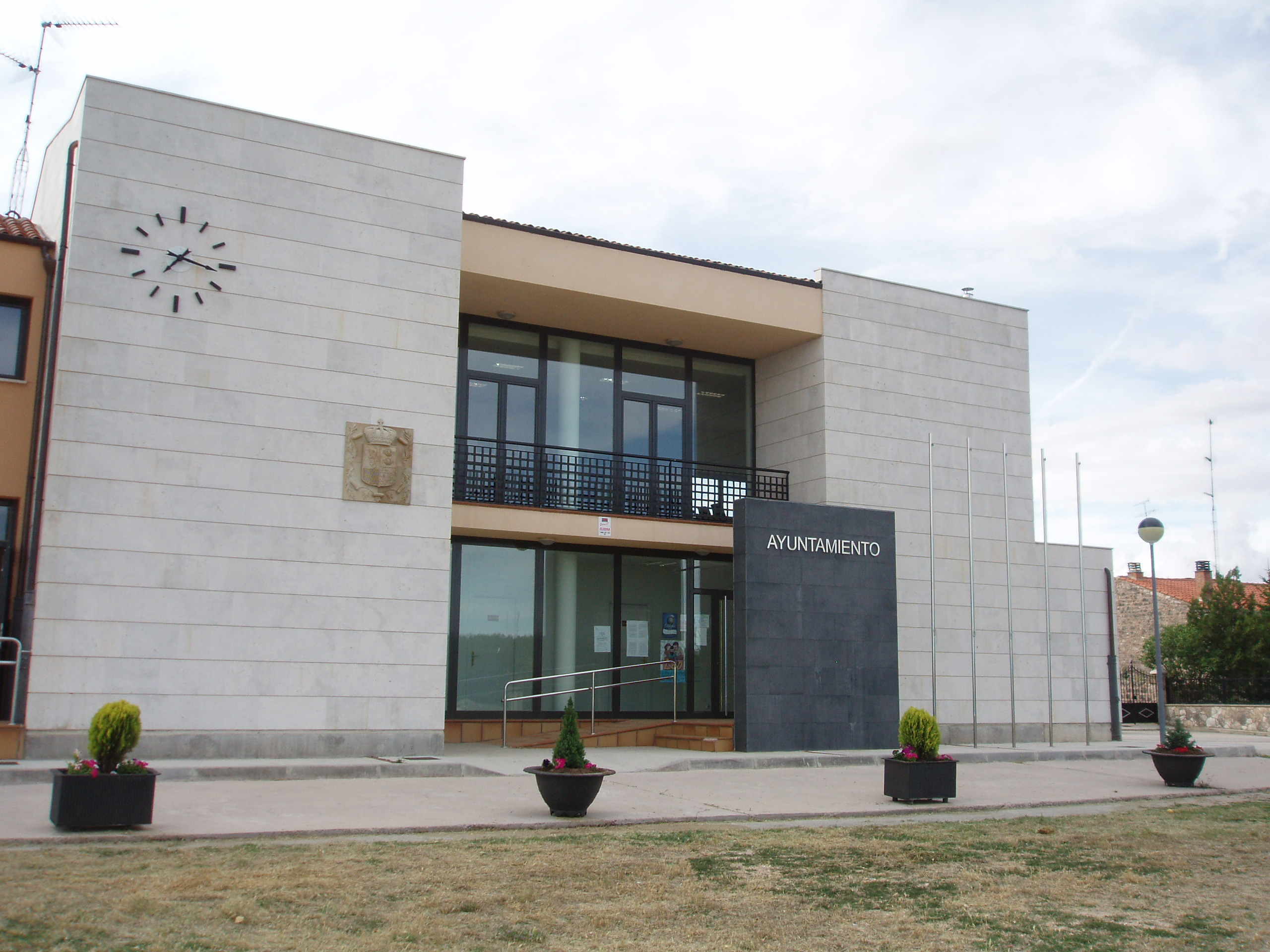 edificio construido entre 2004 y 2006, inaugurado en 2006, siendo alcalde Jacinto Puente Portillo